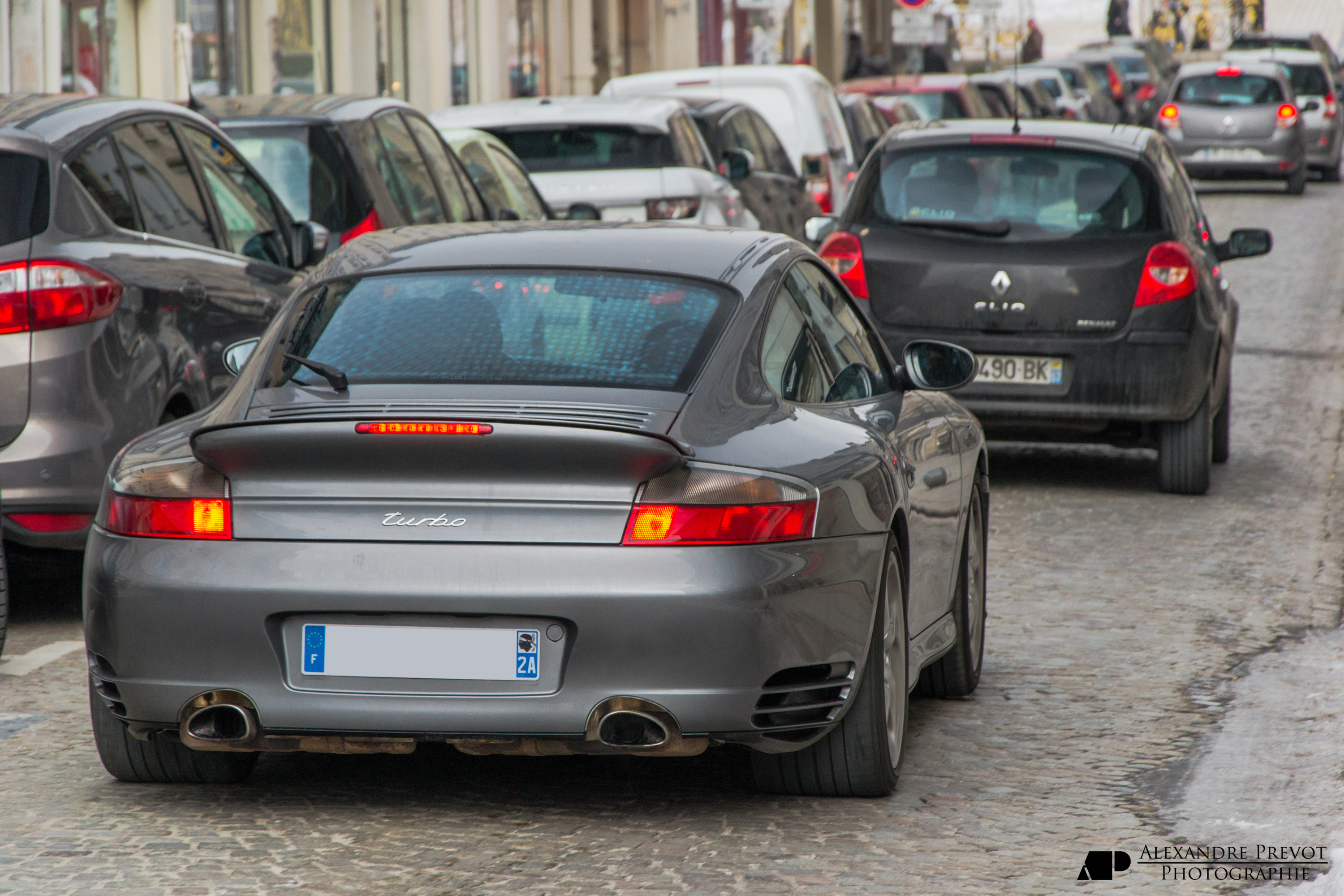 Porsche 996